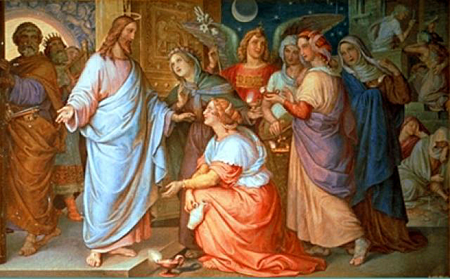 Die klugen und die törichten Jungfrauen